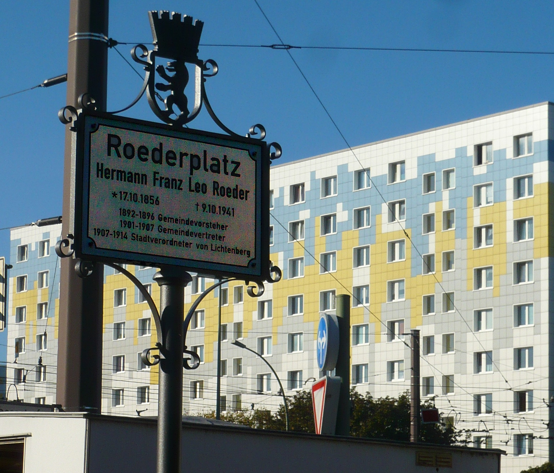 Berlin-Lichtenberg, wieder benannter Roederplatz (neues Schild)